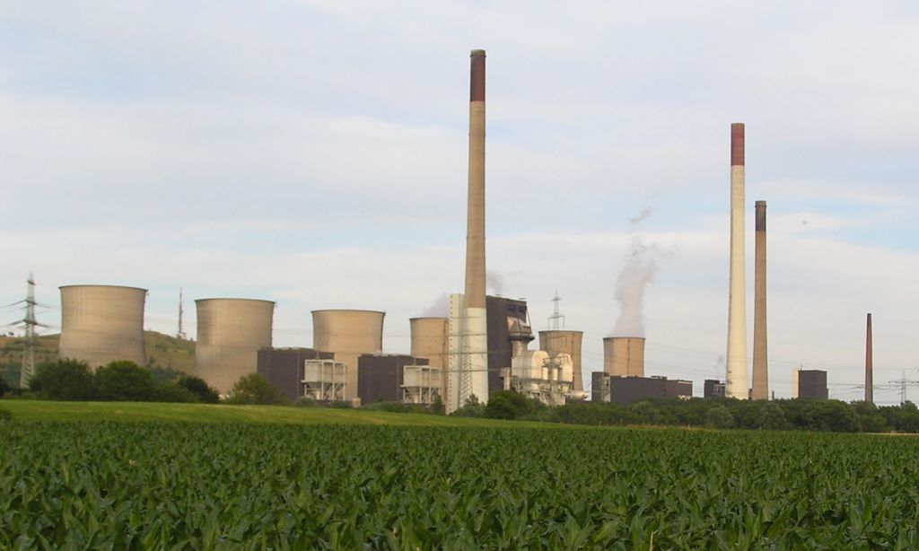 e.on power plant Gelsenkirchen-Scholven from west